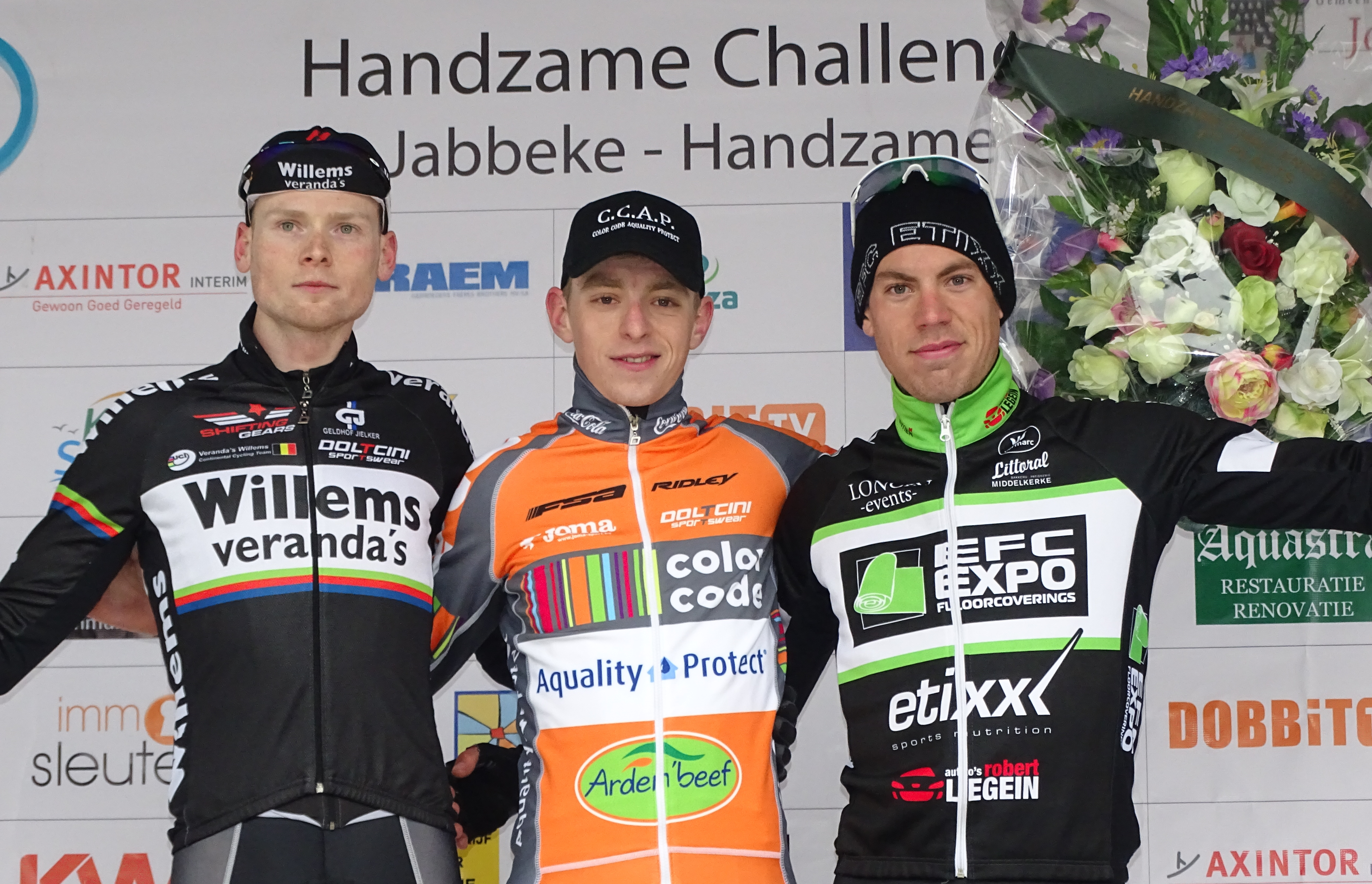 Reportage réalisé le vendredi 20 mars à l'occasion de l'arrivée de la Handzame Classic 2015 à Bredene (Kortemark), Belgique.